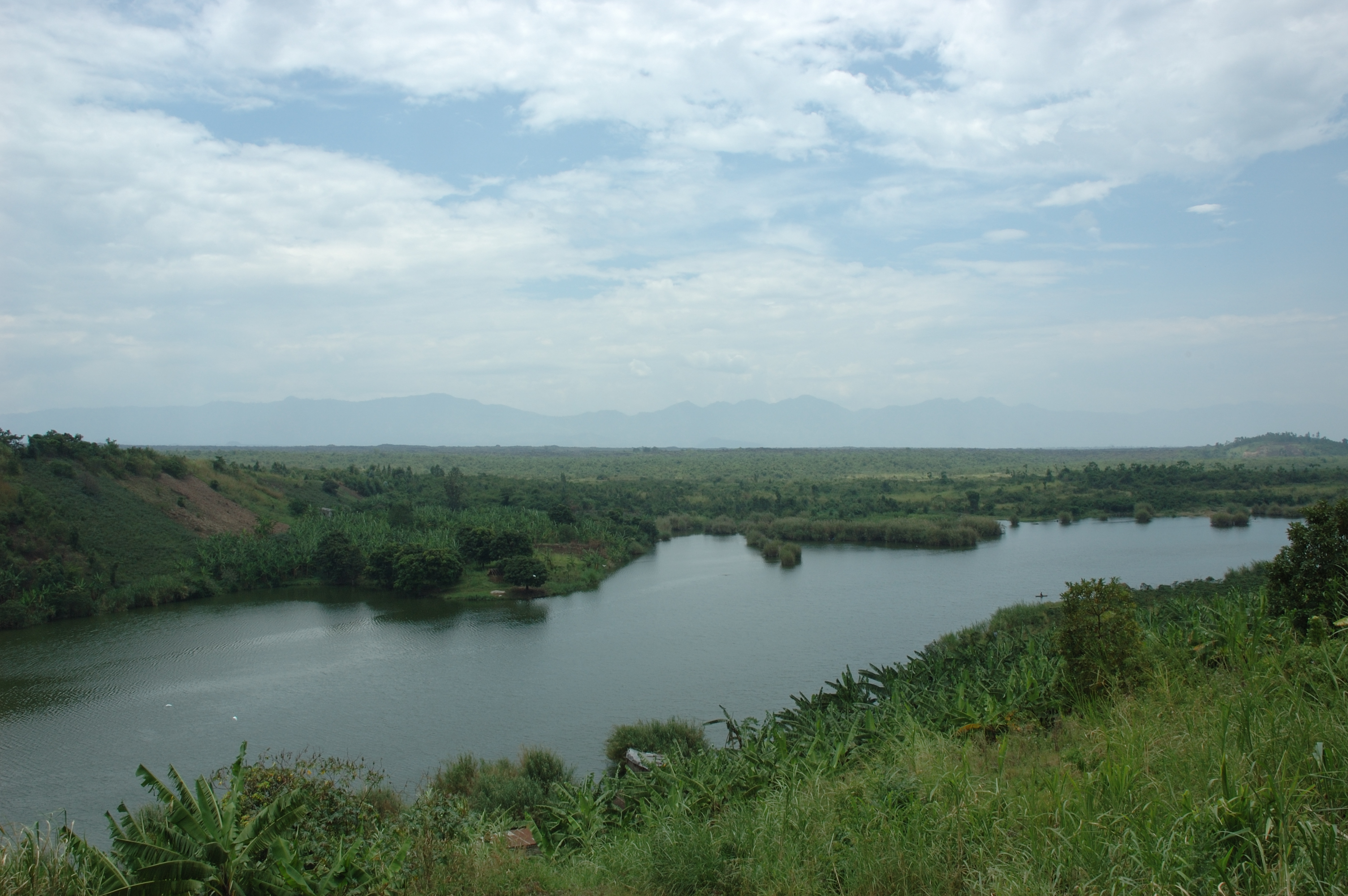 Virunga National Park